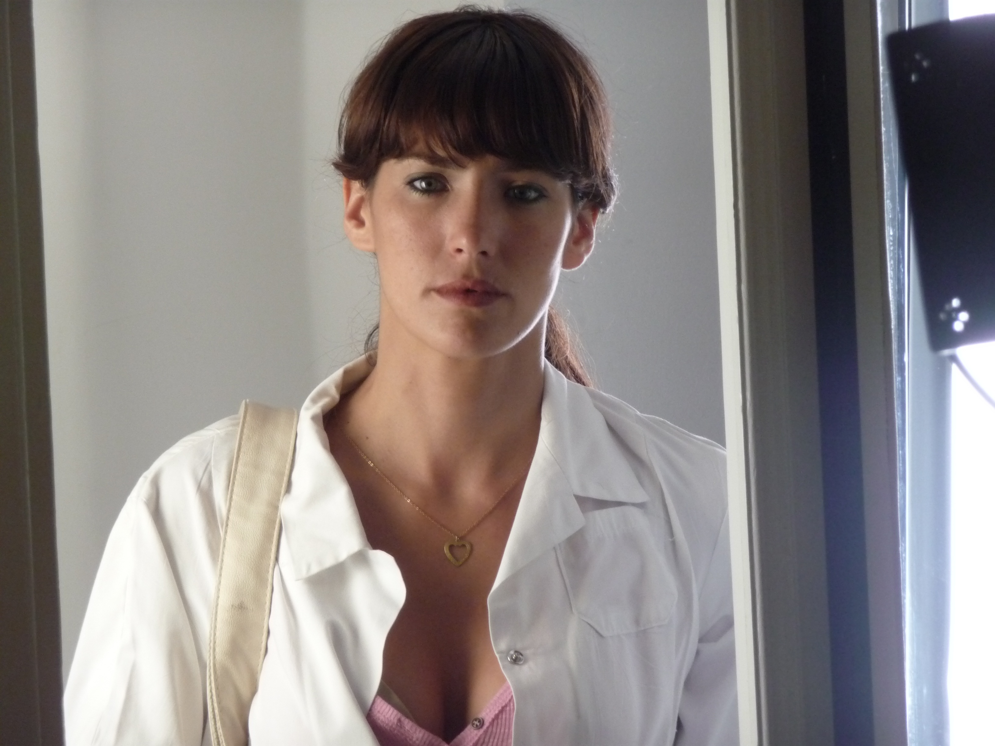 חן יאני מתוך סרטו של דורון ערן נמס בגשם